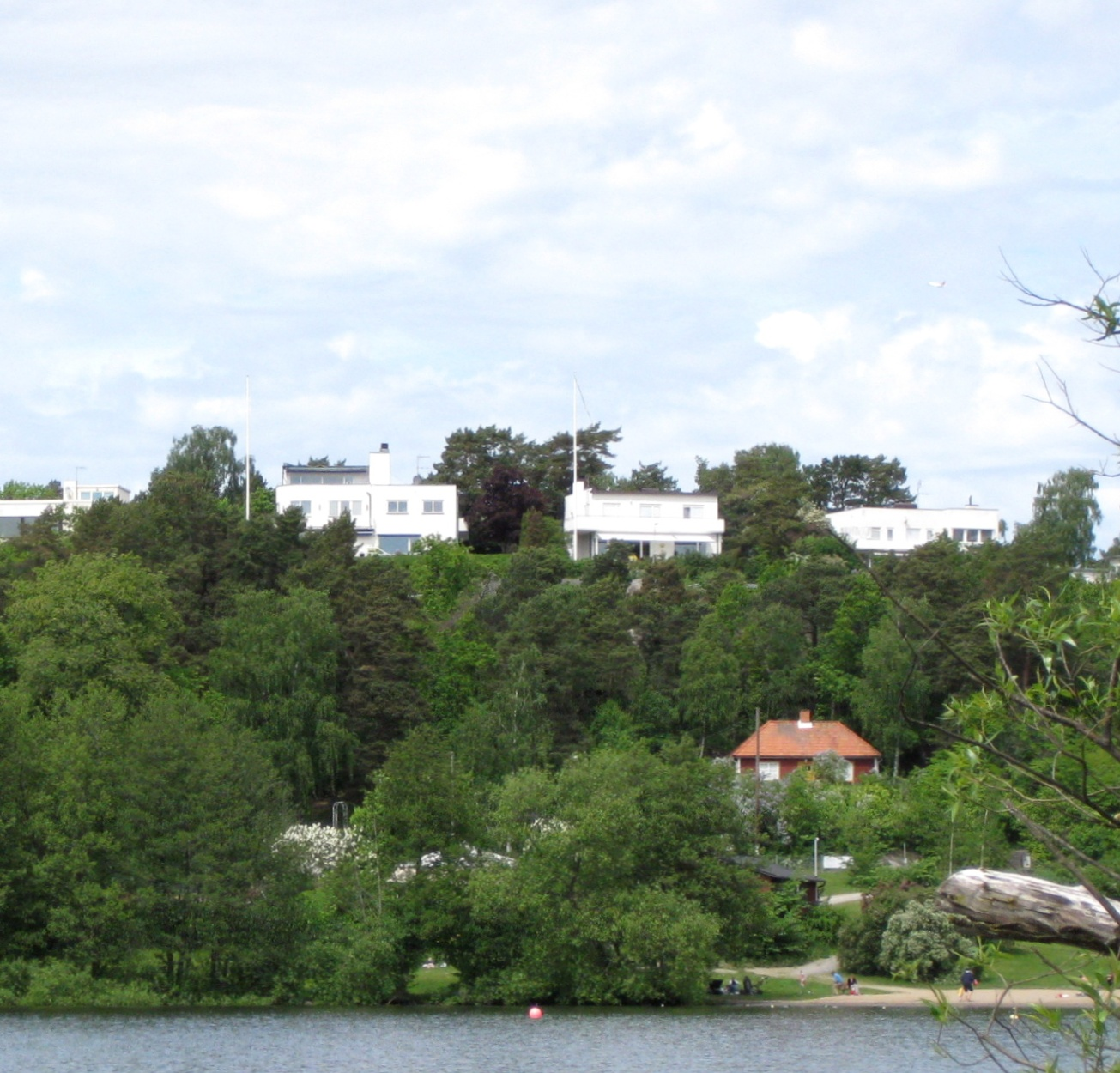 Södra Ängby, Bromma, Stockholm